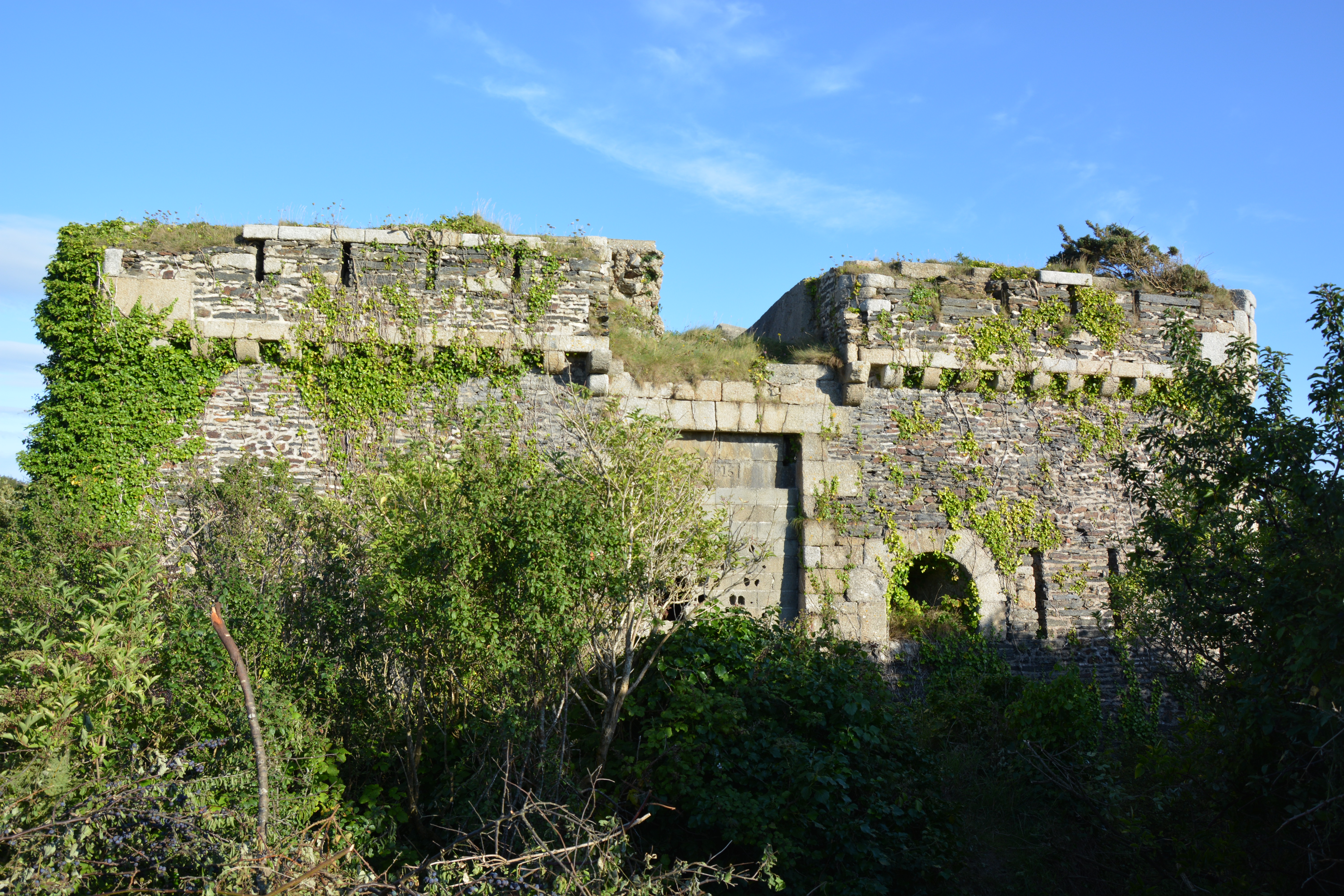 Batterie Haute de Cornouaille (Napoléon), commune de Roscanvel Construction en 1813, pouvant abriter 60 hommes, équipé de 4 canons de 24 ou de 16 à chaque angle de la plateforme supérieure